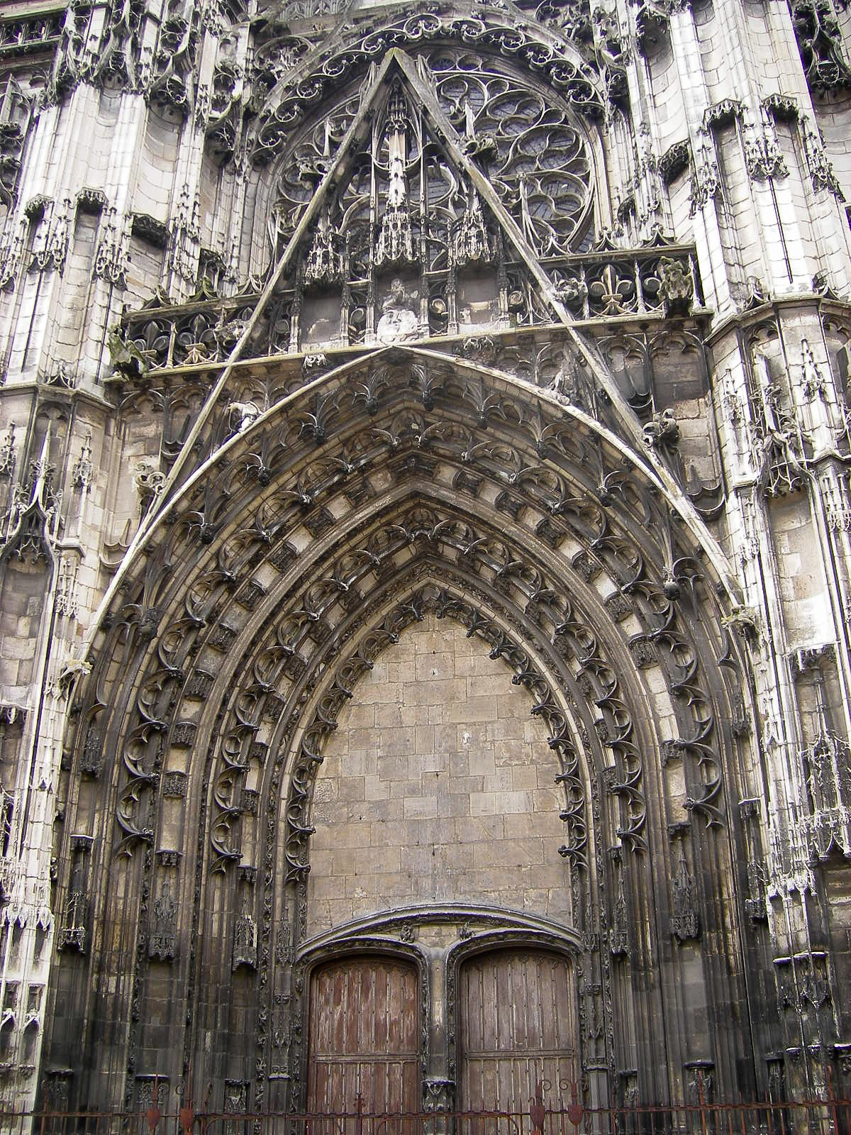 Cathédrale Saint-Pierre-et-Saint-Paul de Troyes